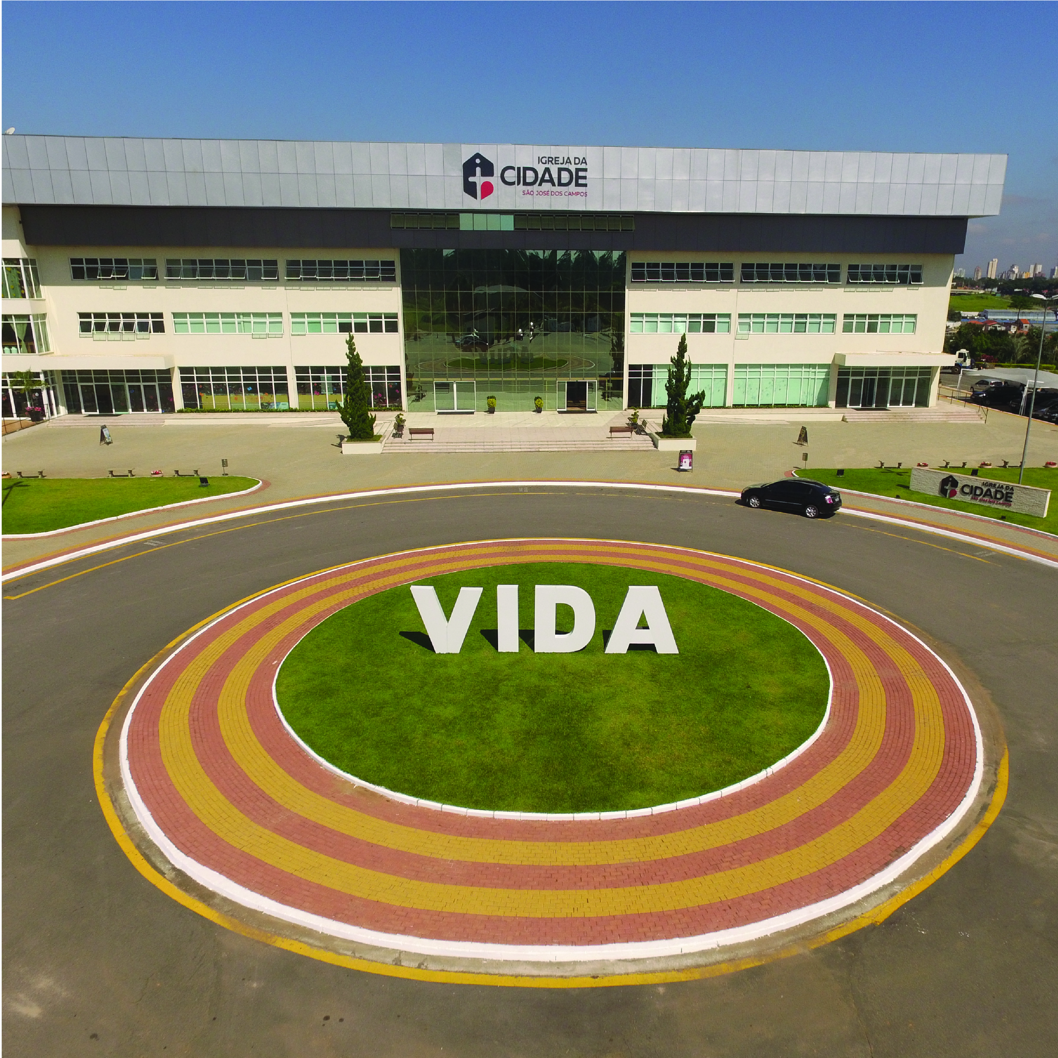 Foto da Igreja da Cidade em São José dos Campos